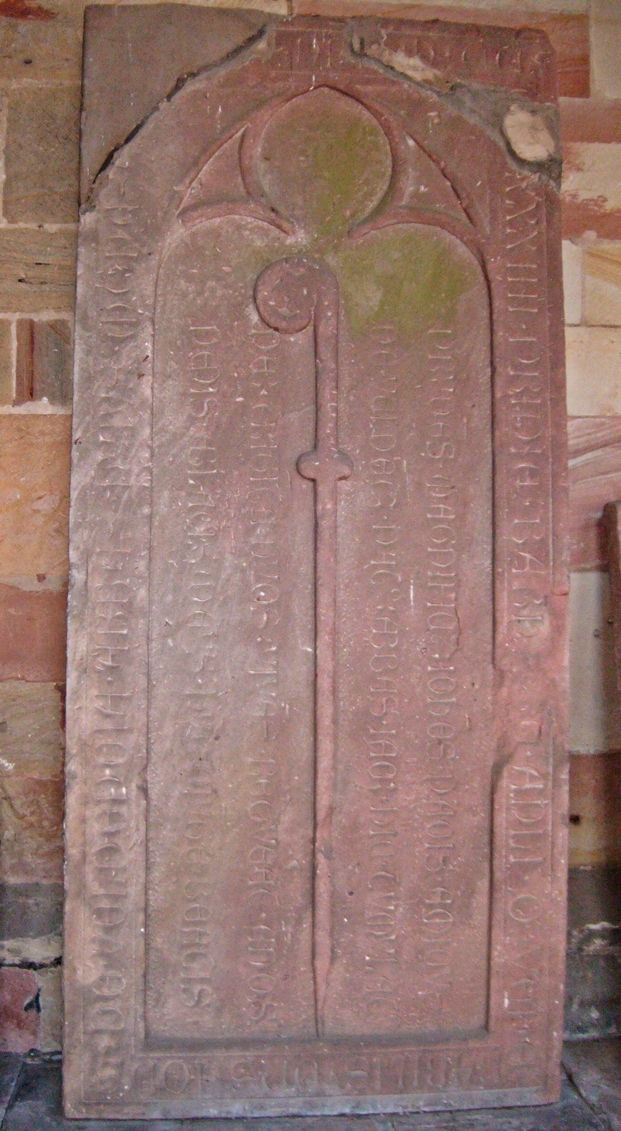 Grabplatte des Weissenburger Abtes Graf Johann von Veldenz aus dem Haus Geroldseck (+ 1434), Kreuzgang der Abteikirche St. Peter und Paul, Wissembourg (Elsass)